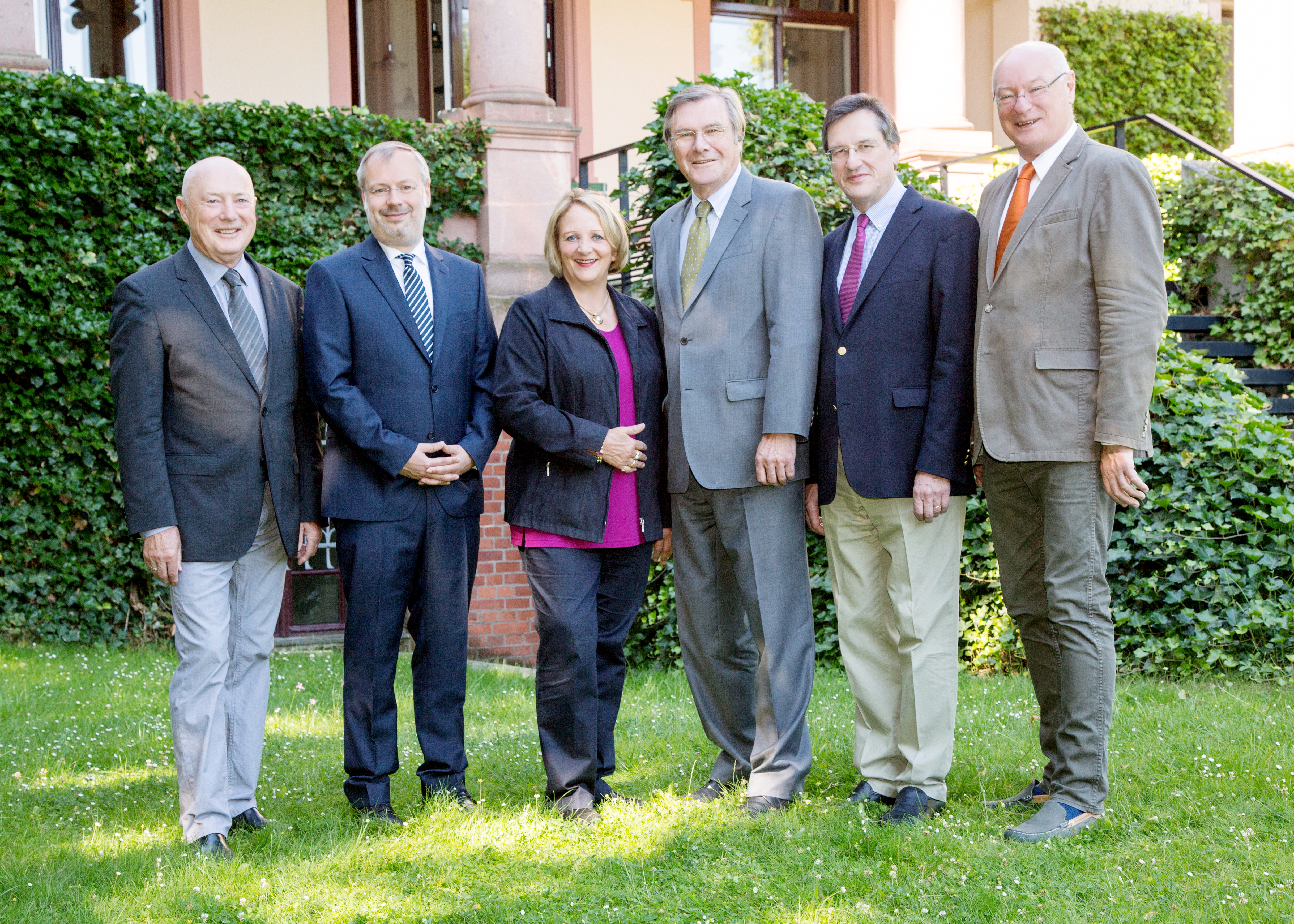 Der Vorstand der Friedrich-Naumann-Stiftung für die Freiheit, 2017: v.l.n.r.: Dr. Wolf-Dieter Zumpfort, Steffen Saebisch/Hauptgeschäftsführer, Sabine Leutheusser-Schnarrenberger, Dr. Wolfgang Gerhardt, Prof. Karl-Heinz Paqué, Manfred Richter.